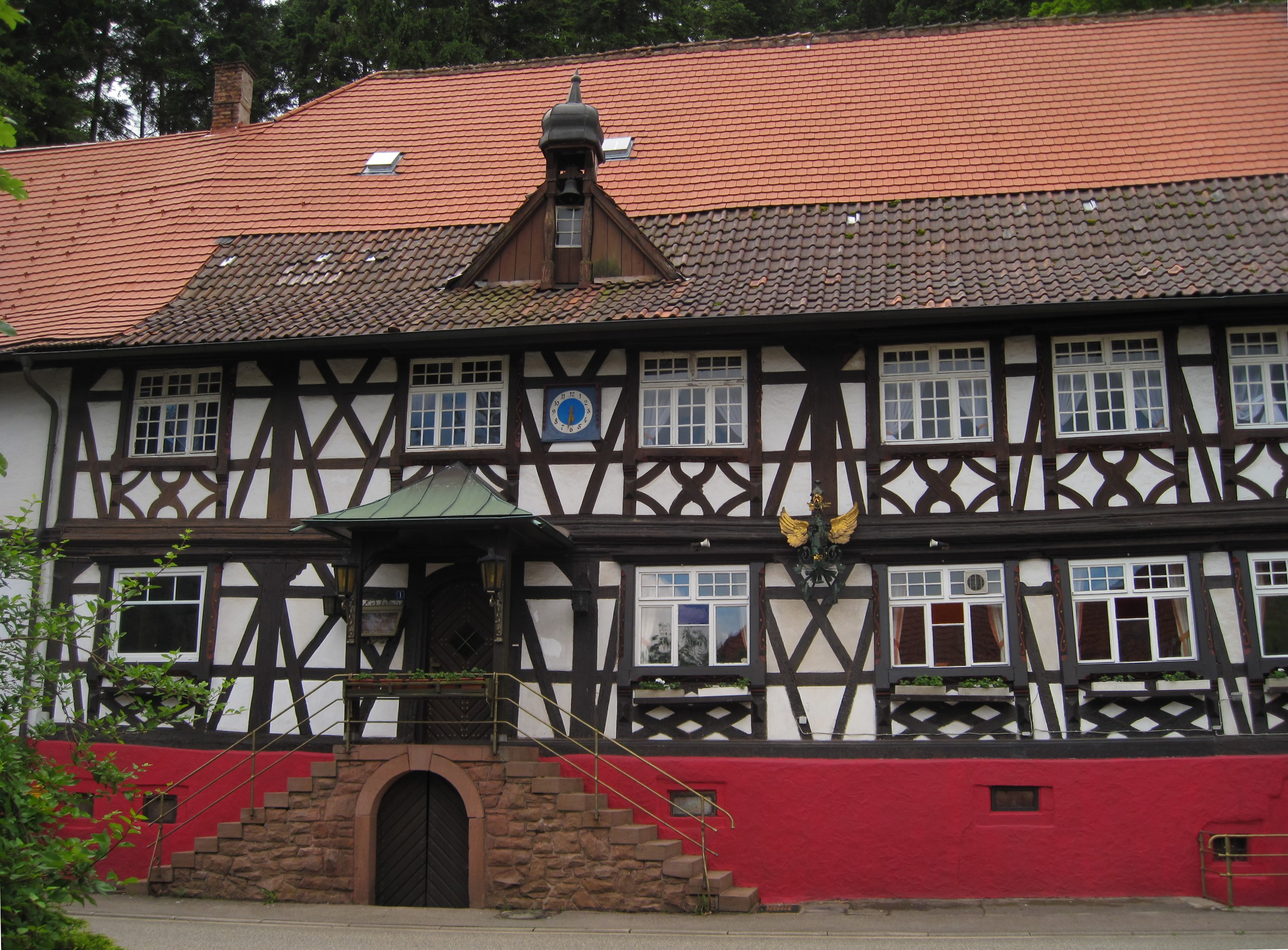 „Herberge zum Löwen“ (Gasthaus Löwen), Ludwigstraße 1 in Seelbach-Schönberg. Hinweistafel am Gebäude: Ehemalige Lehenswirtschaft der Geroldsecker 1242. Als Herberge am Berg 1370 urkundlich erwähnt.